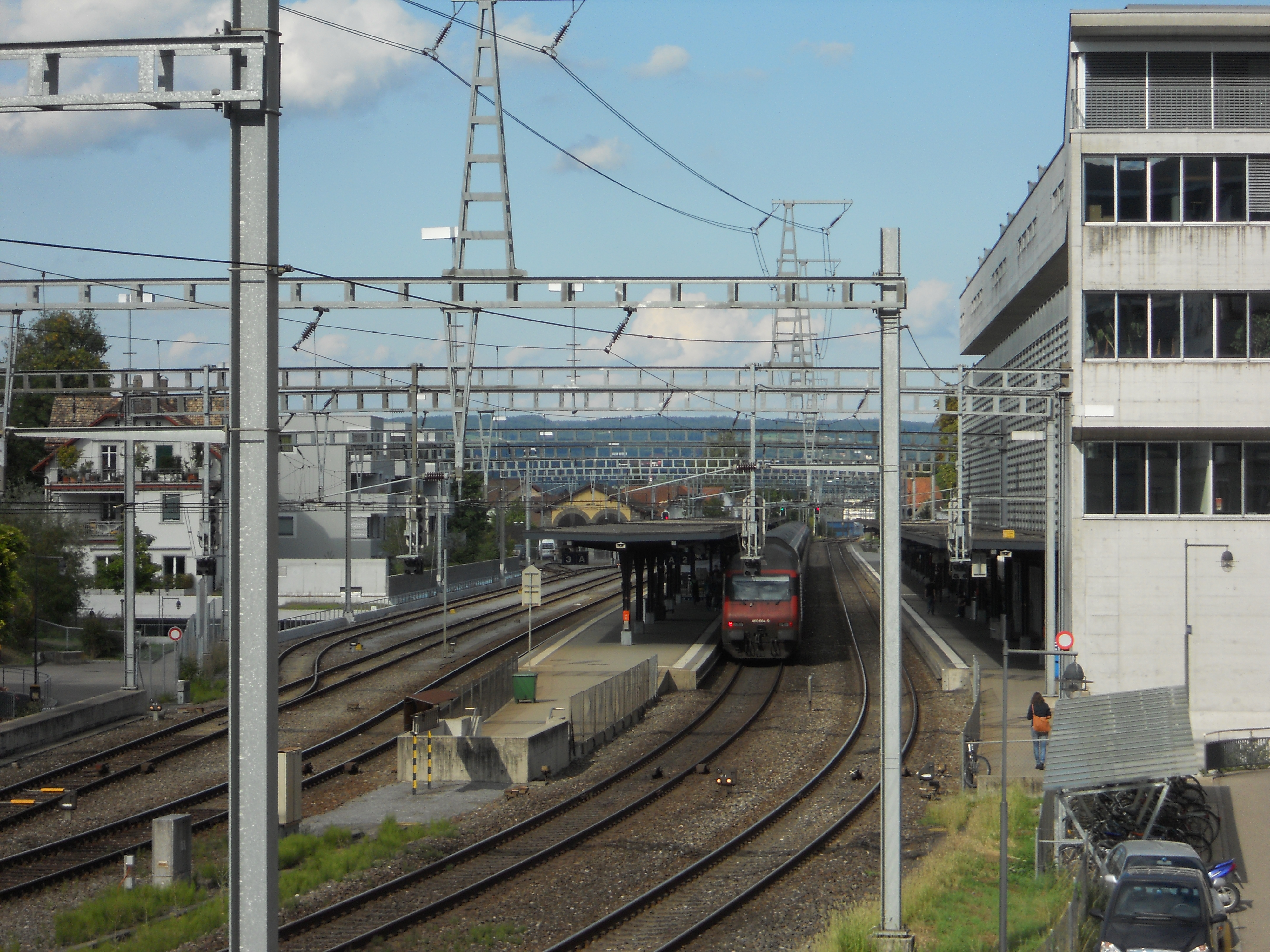 Bahnhof Frauenfeld aus dem Westen fotografiert. Ein Inter-Regio Zug Richtung Weinfelden auf Gleis 2.